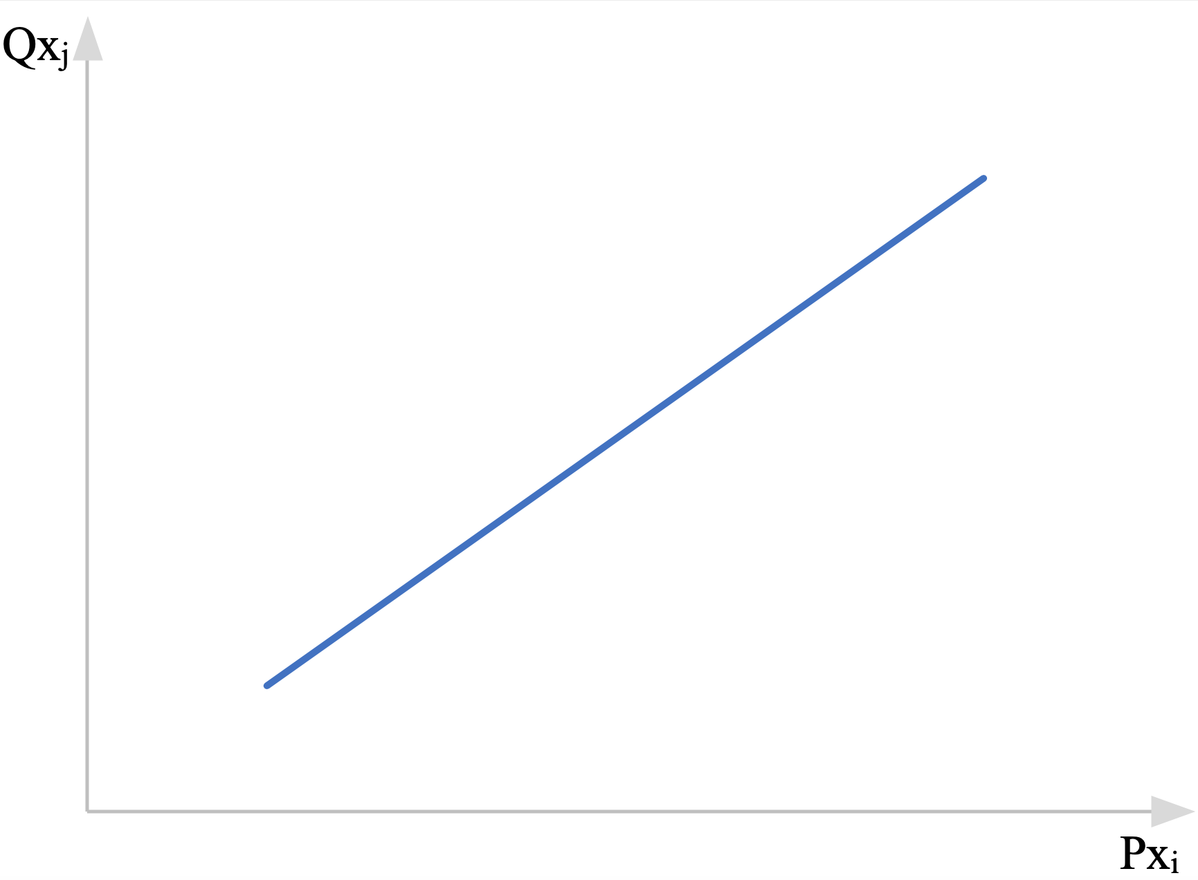 Zależność między ceną dobra xi, a popytem na dobro xj